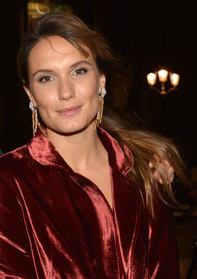 Ana Girardot au dîner des révélations des César du cinéma